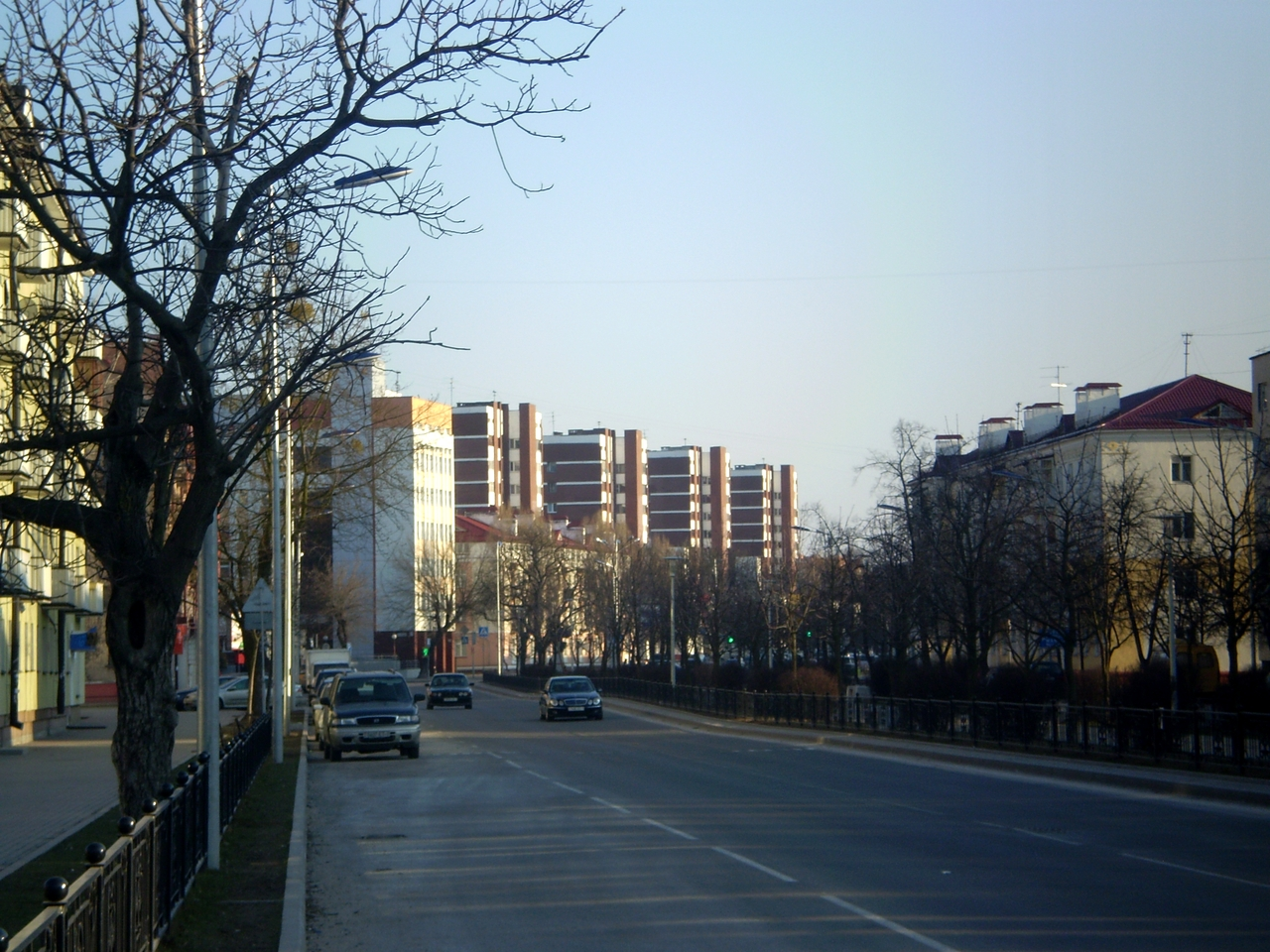 Бул. Касманаўтаў